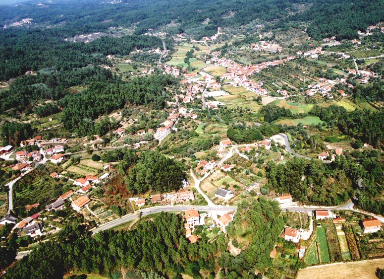 Imagem panoramica da aldeia tirada de helicoptero